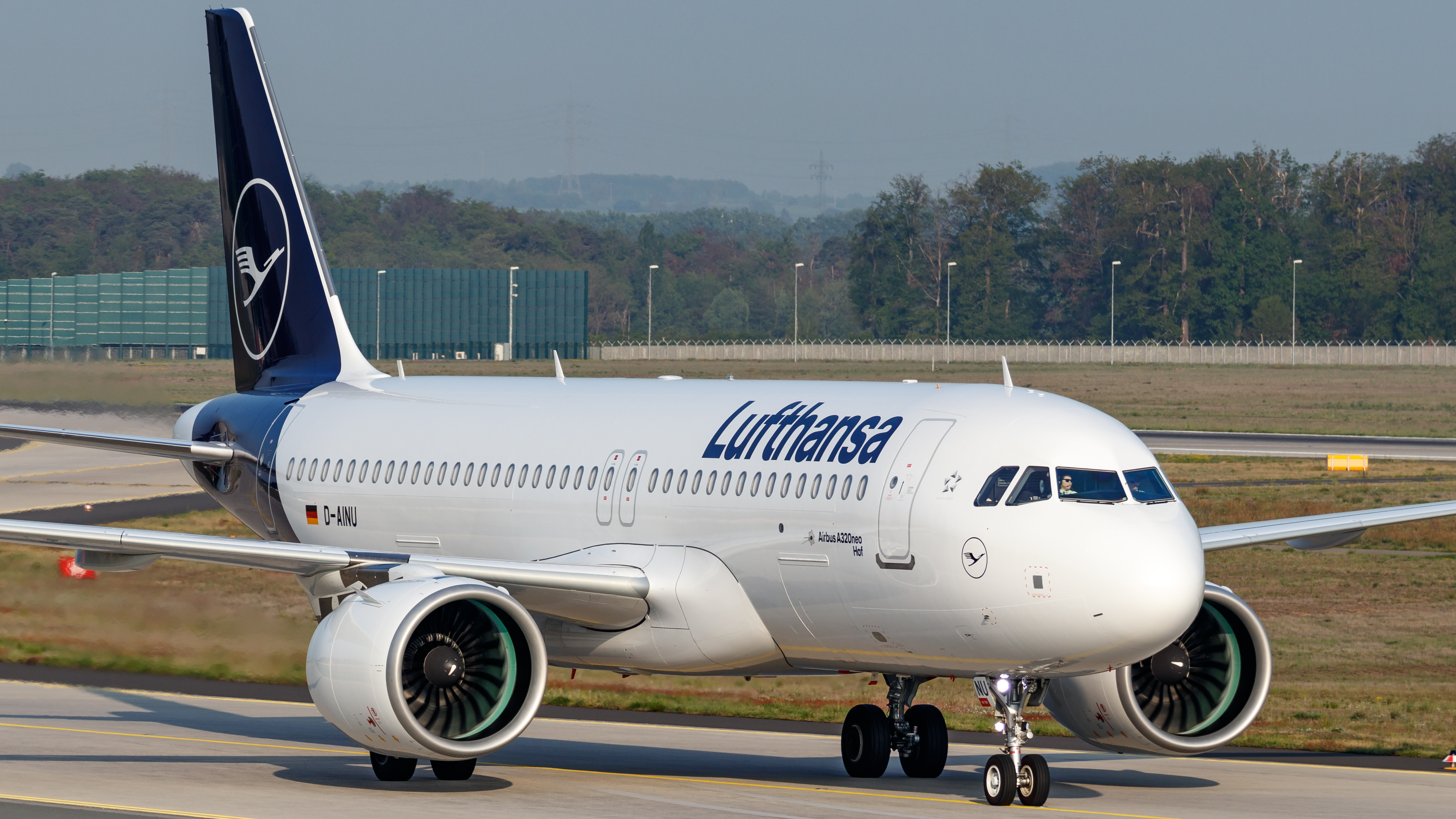 D-AINU Lufthansa A320neo FRA